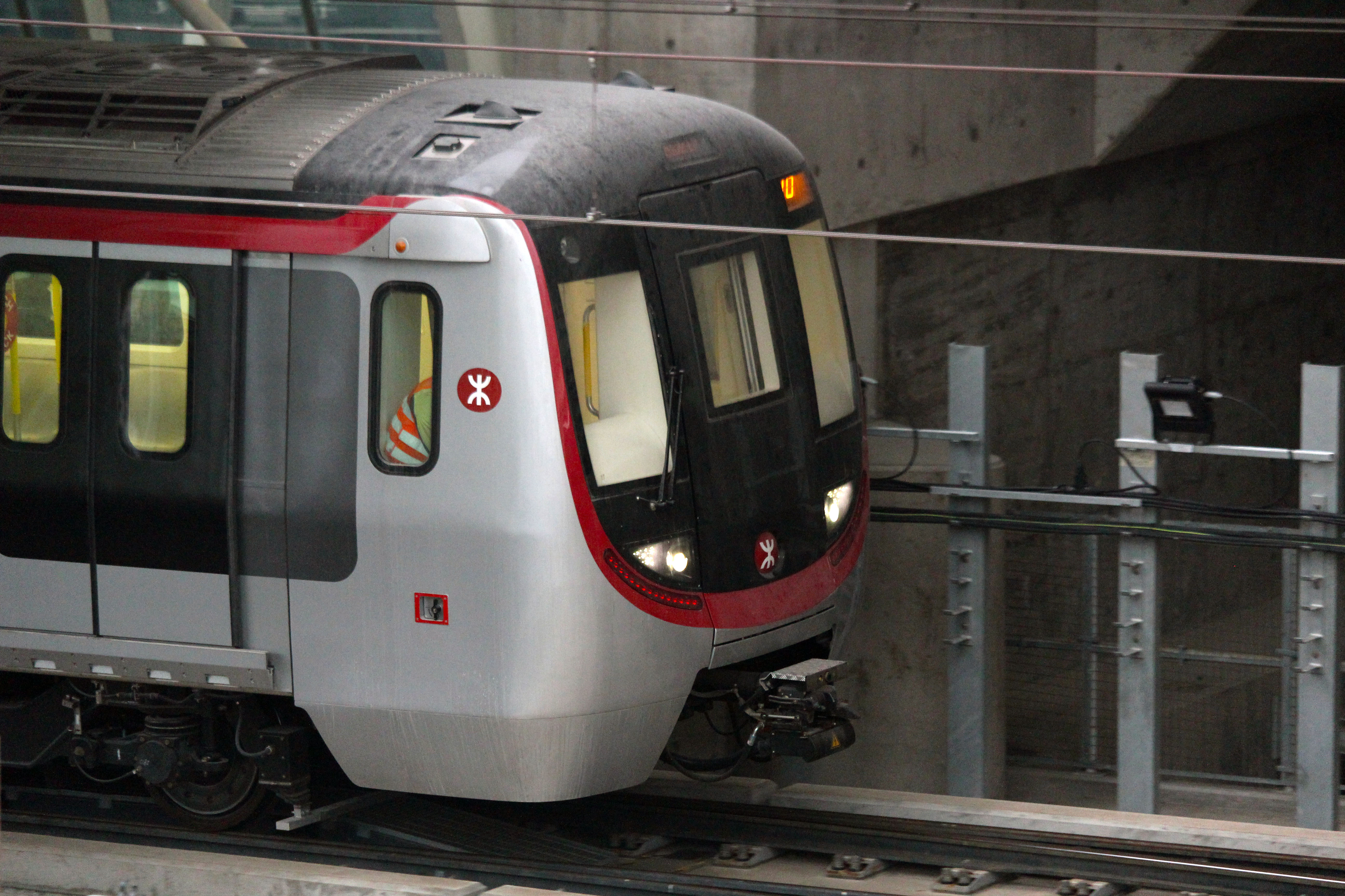 南港島綫中國製列車正進入黃竹坑站